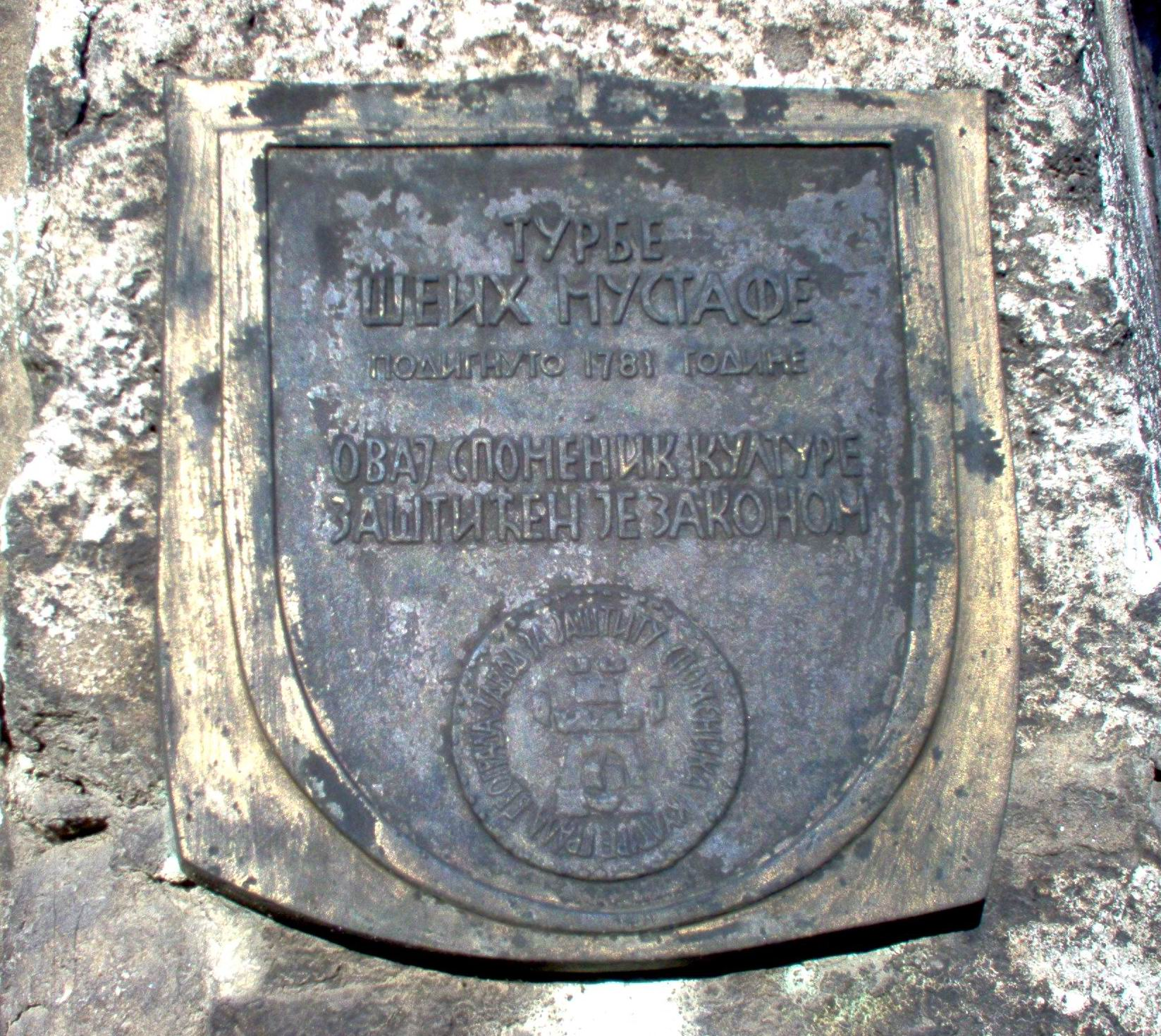 Ознака на турбету шеих Мустафе у београду. Фотографисао Голдфингер